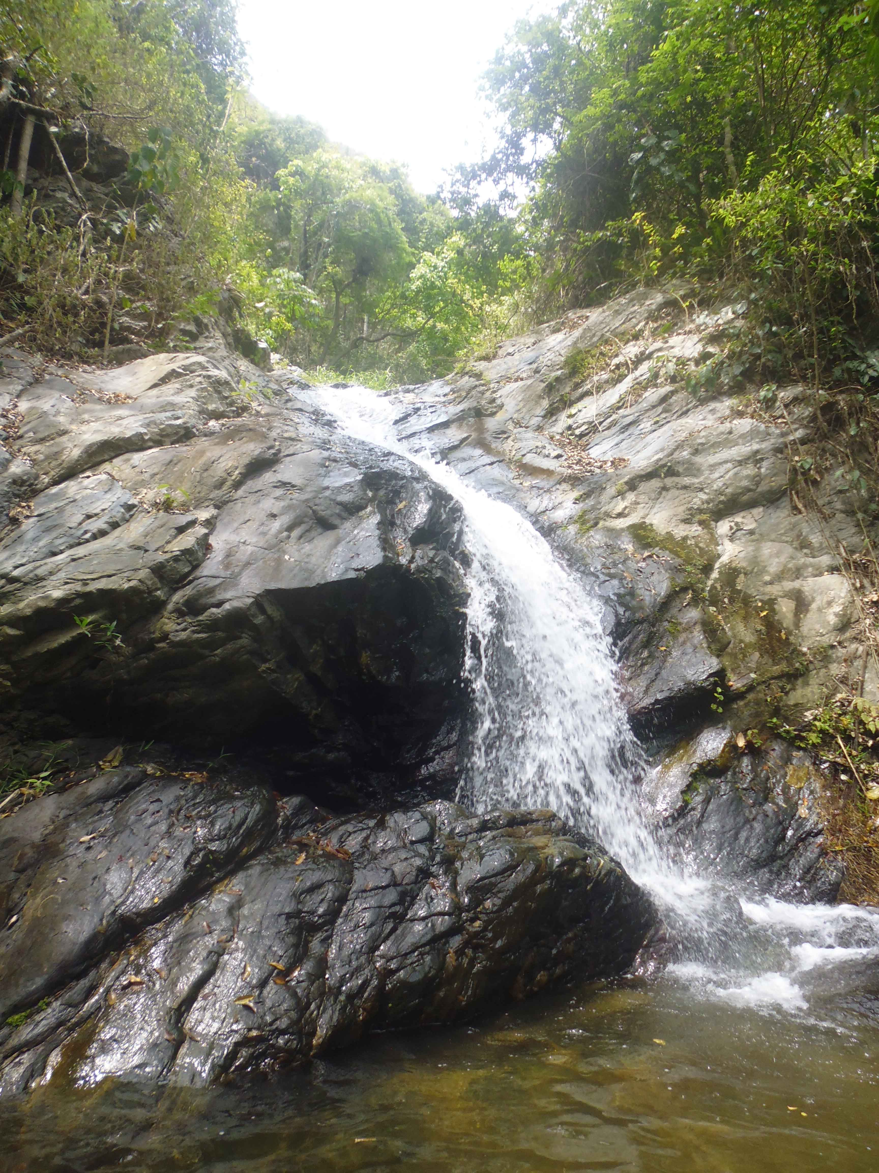 Catarata de Tamaira